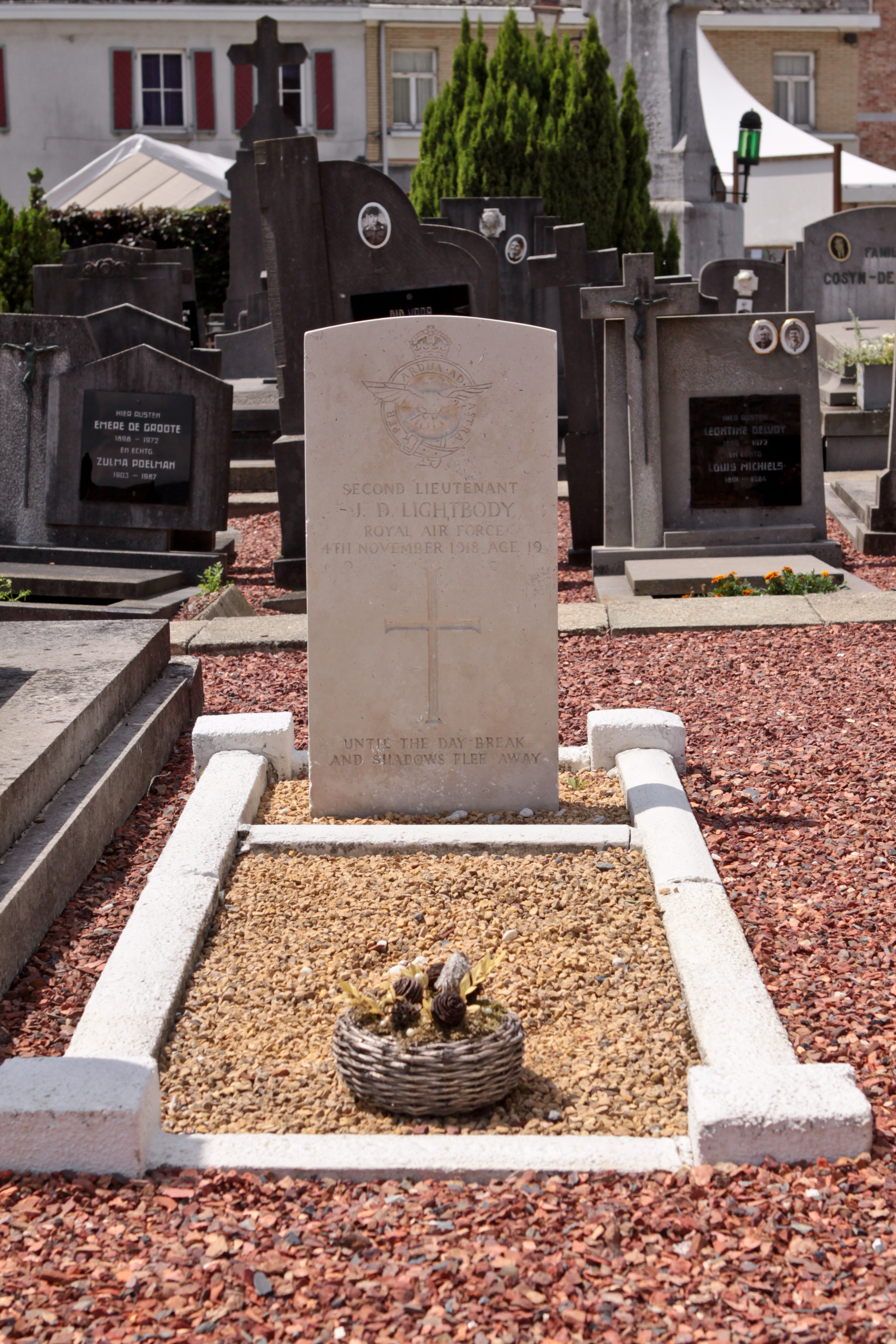 Scheldewindeke Churchyard